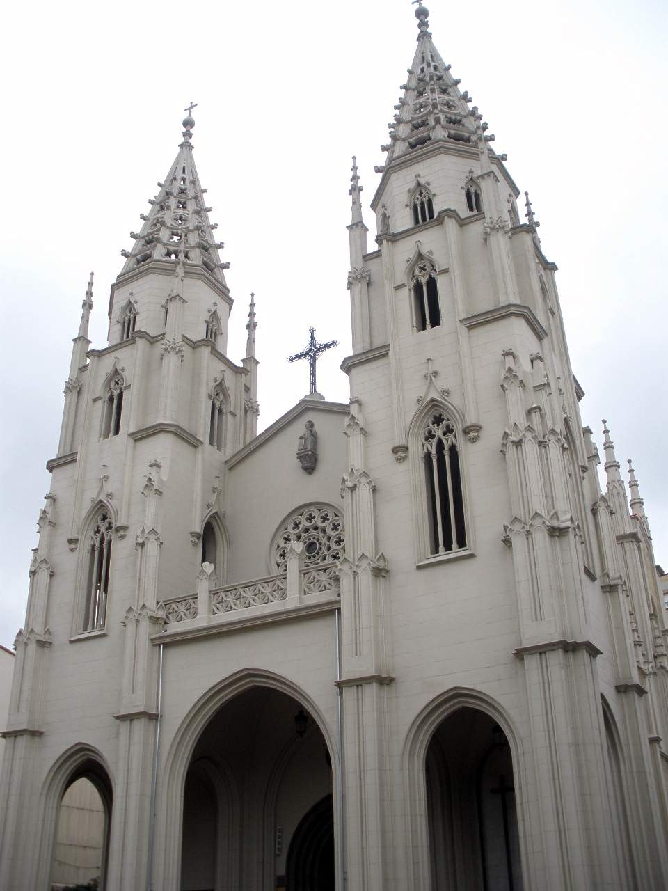 Sama (Langreo) - Iglesia de Santiago Apóstol